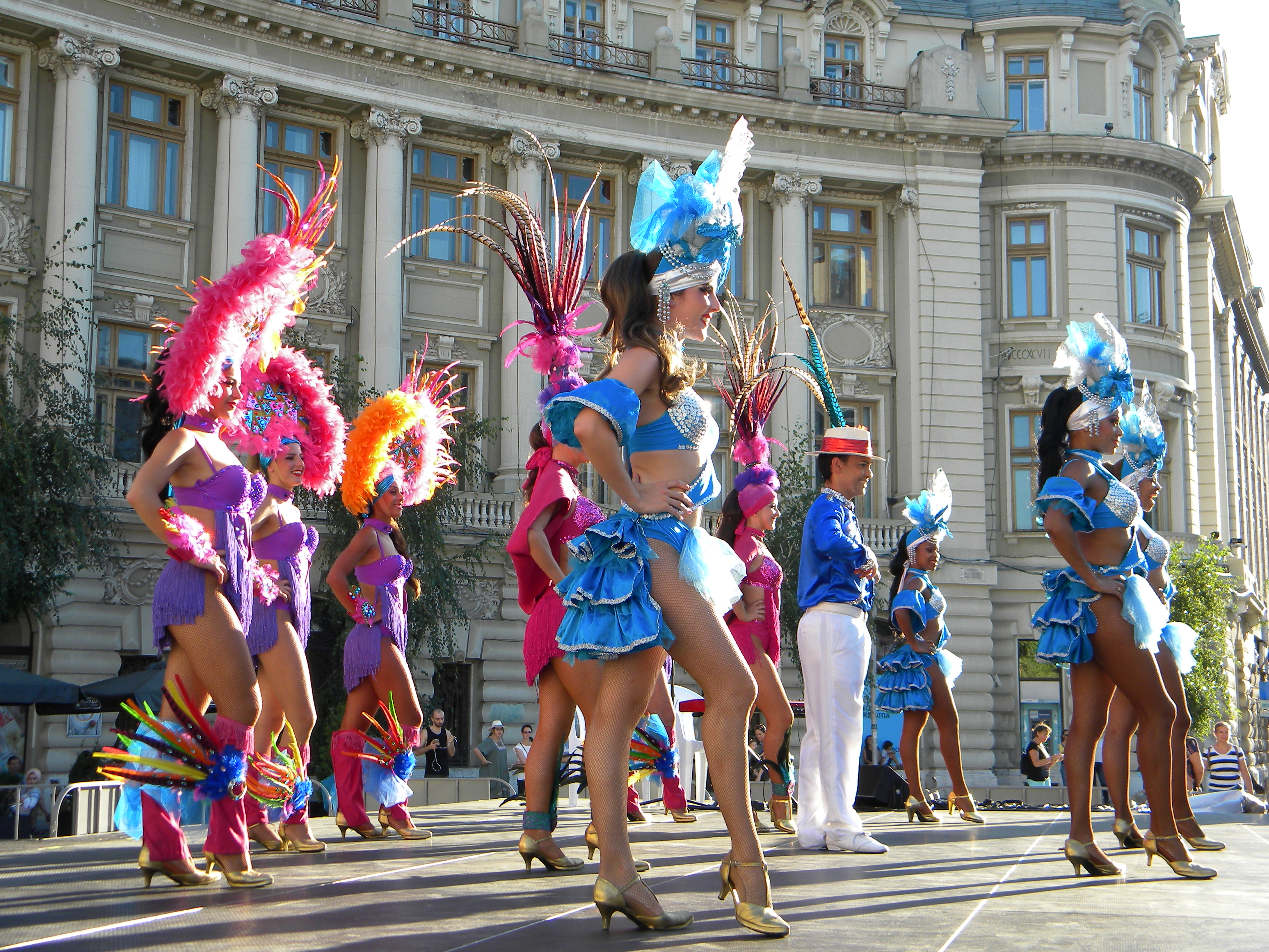 Bucuresti. Romania. Festivalul International de teatru de Strada, Bucuresti, 1-30 Iulie 2017. (Trupa de dans latino, Franta)